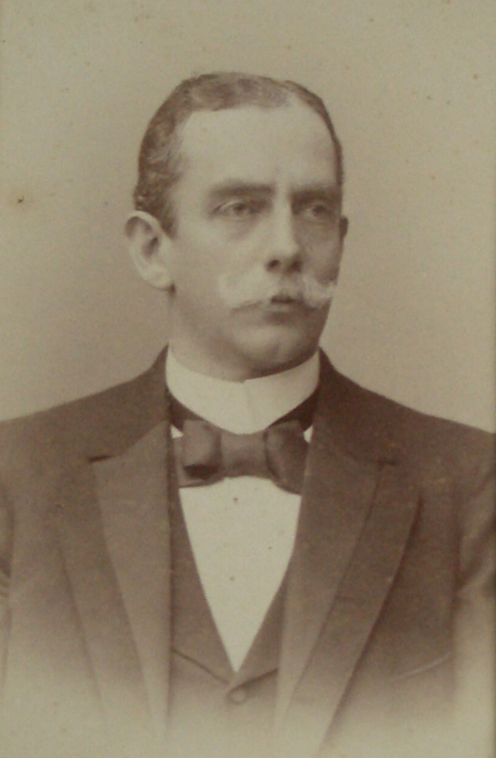 Porträtfotografie von Robert Dalen